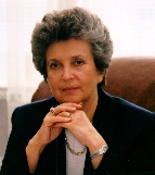 Alicja Grześkowiak - Senator I, II i III kadencji Senatu RP. Wicemarszałek Senatu RP II kadencji